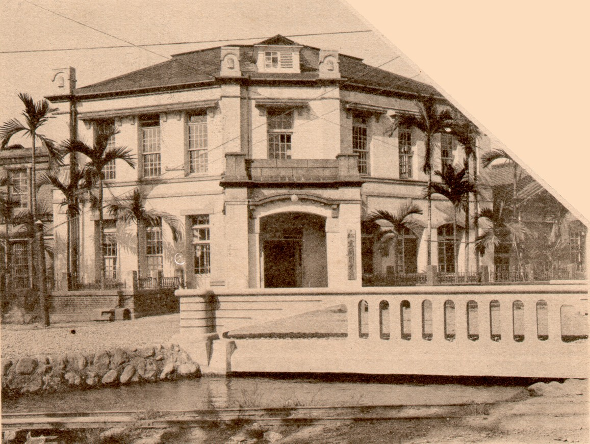 中文（台灣）: 宜蘭公會堂，位於宜蘭公園內，已拆除